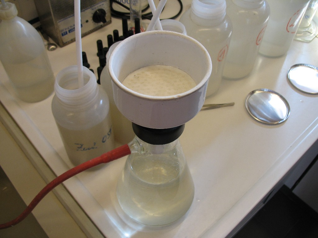 Filter mit Nutsche und Saugflasche